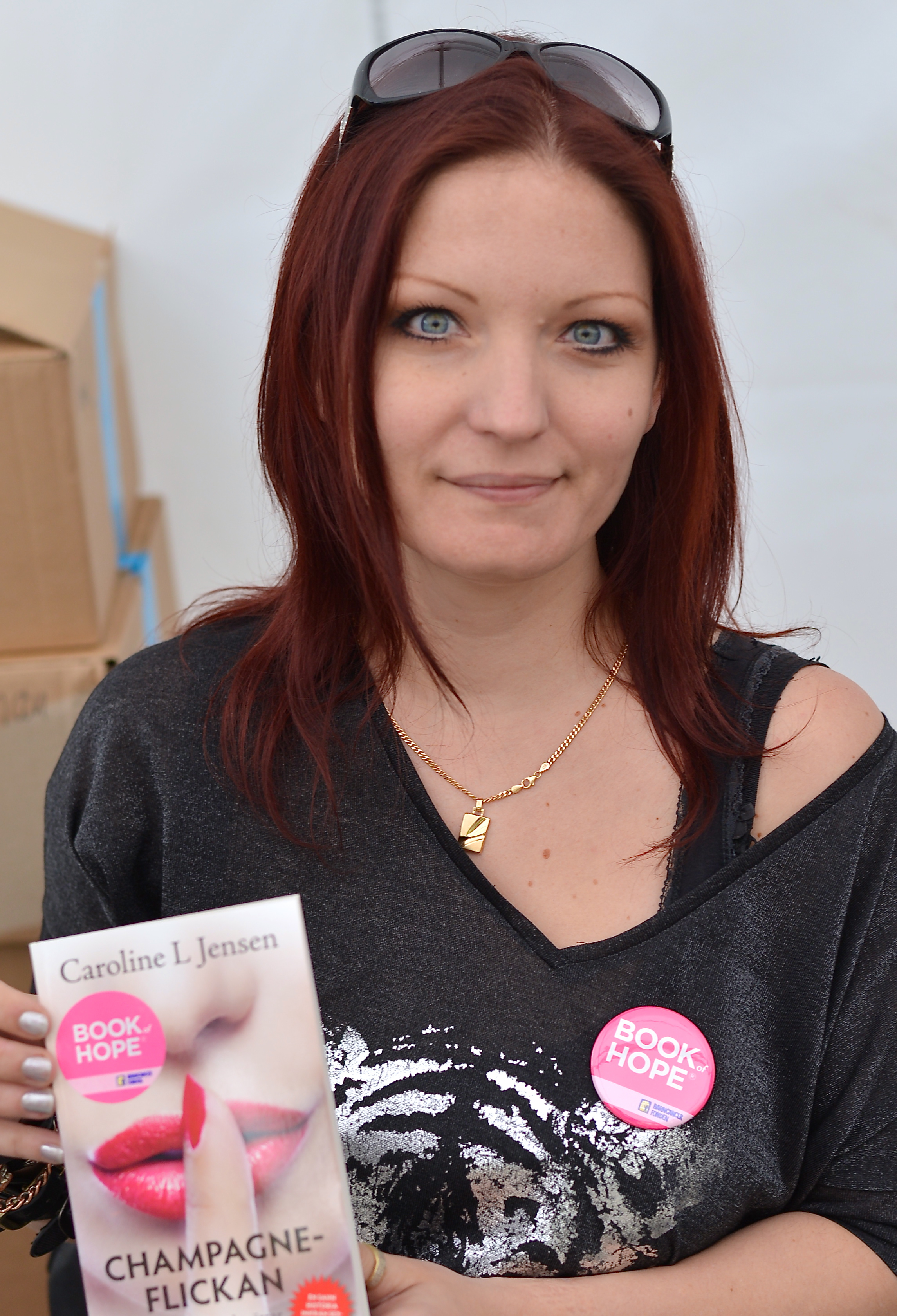 Caroline L Jensen i Kungsträdgården i Stockholm den 22 maj 2013 i samband med en kampanj för Barncancerfonden.